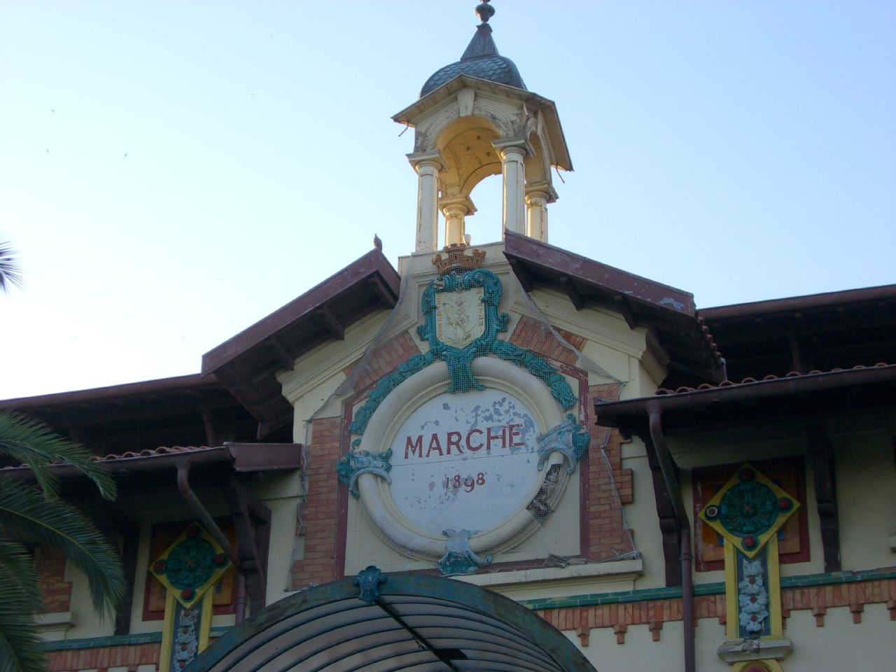 La façade du marché couvert de Menton dans les Alpes maritimes.